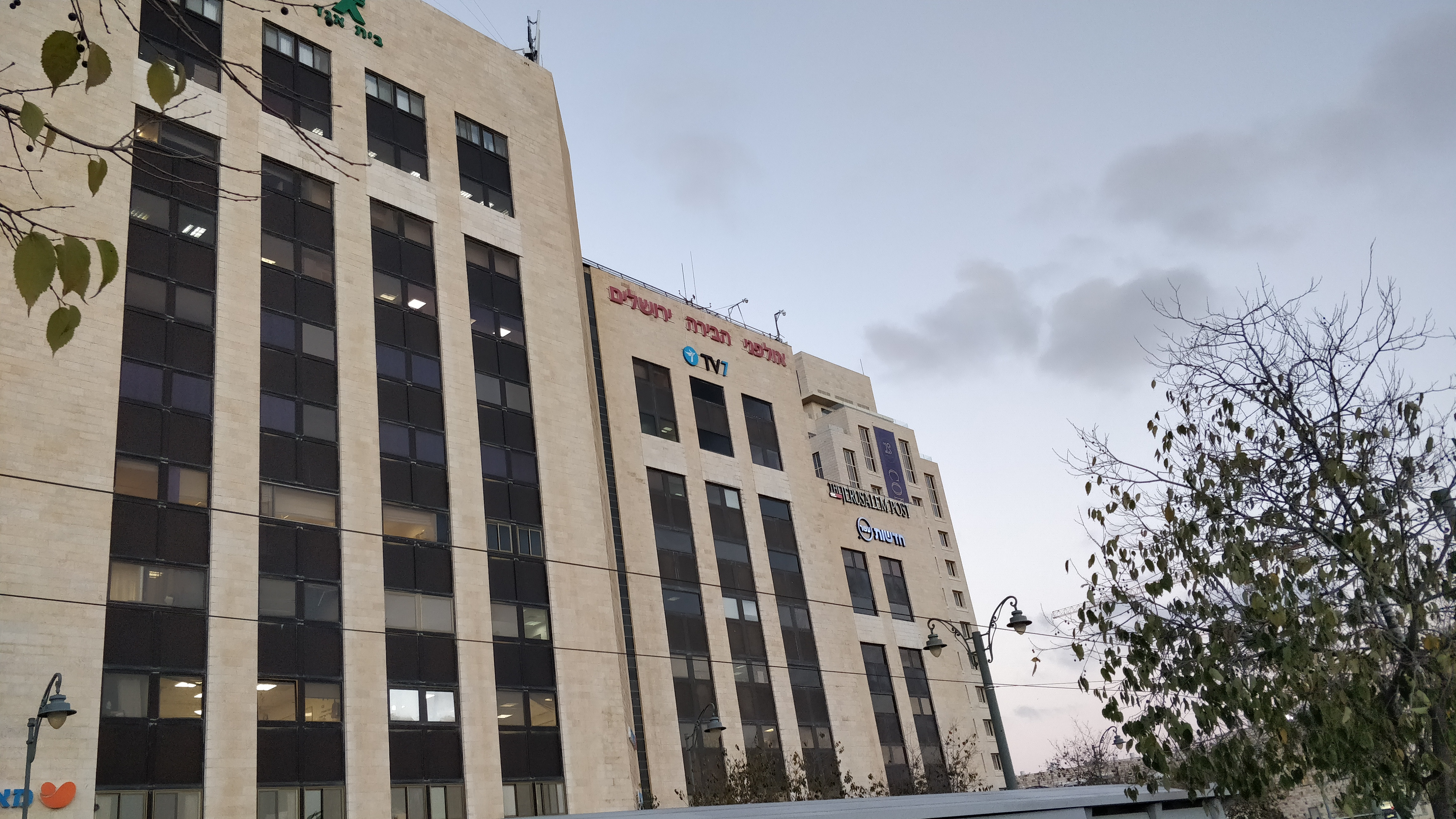 חזית אולפני חדשות עשר בירושלים, דצמבר 2018